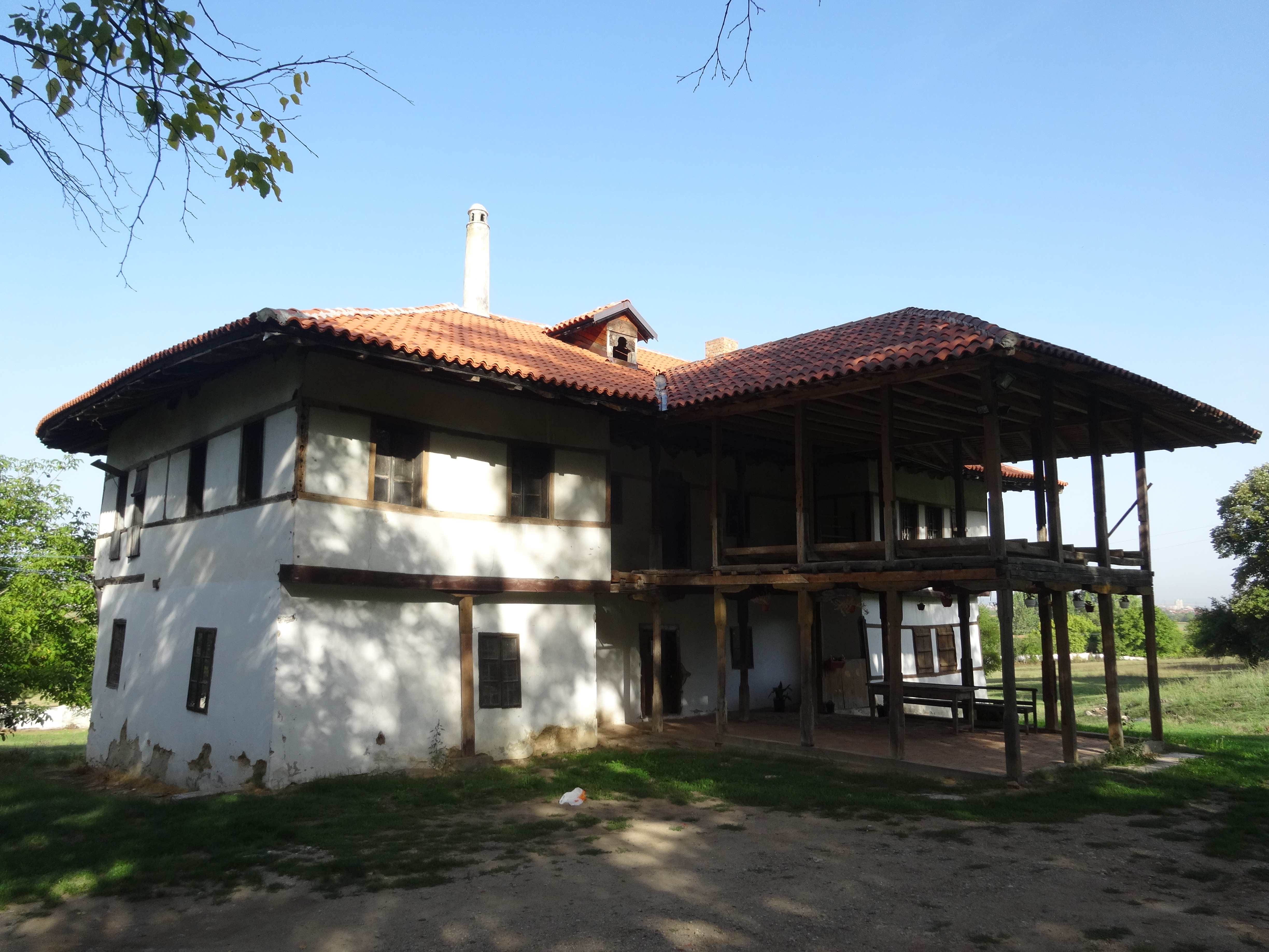 Rudare, Leskovac